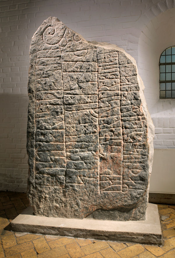 Foto af Roberto Fortuna 2012